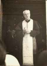 Dr. Gulovics Andor